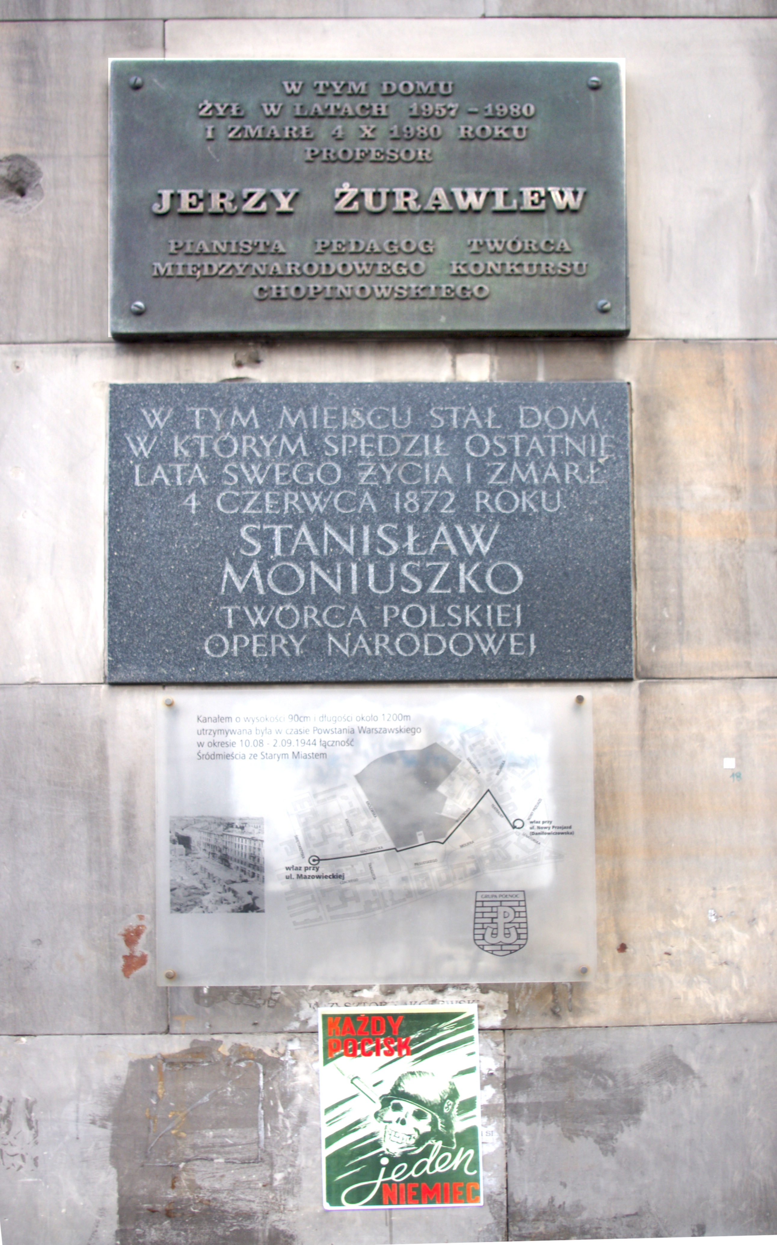 Tablice upamiętniające kompozytorów Stanisława Moniuszkę i Jerzego Żurawlewa na kamienicy przy ul. Mazowieckiej 3/5 w Warszawie, gdzie mieszkał i zmarł Stanisław Moniuszko (w stojącej w tym miejscu nieistniejącej już kamienicy) i gdzie mieszkał w latach 1957-1980 i zmarł Jerzy Żurawlew. Trzecia tablica upamiętnia przebiegający obok kanał, którym podczas powstania warszawskiego biegła łączność między Śródmieściem i Starym Miastem